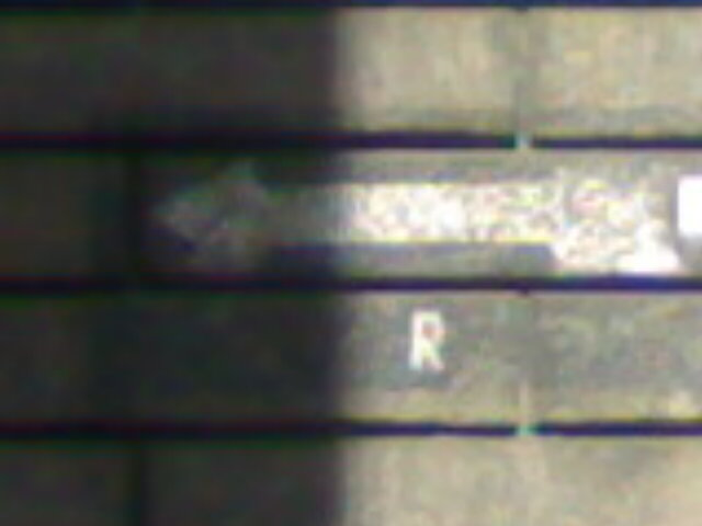 Foto scattata a Livorno. Il rifugio si trova in uno scantinato di un palazzo. Qua vediamo l'indicazione "freccia" e sottostante la R.